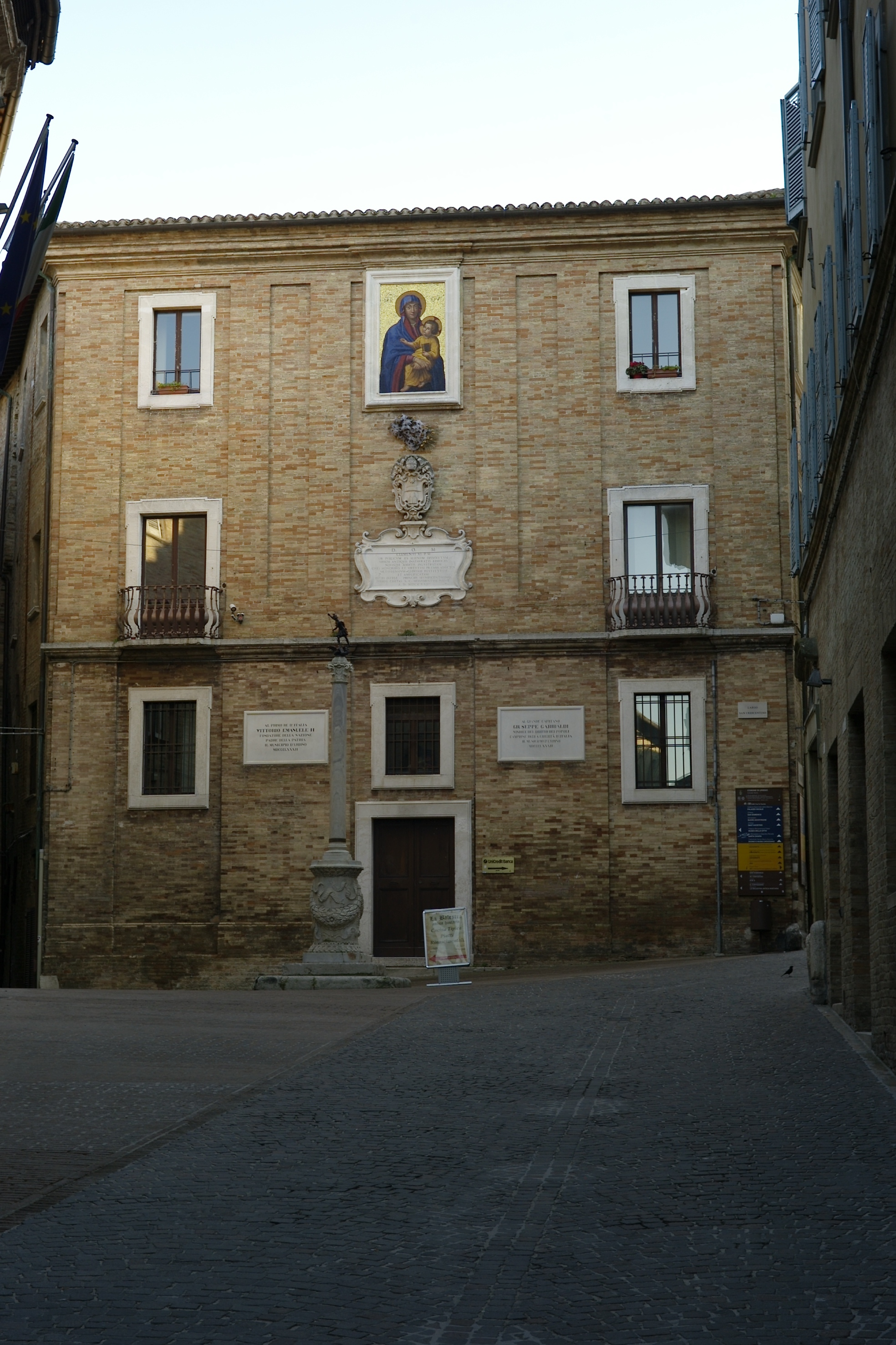 La facciata settentrionale del Palazzo Comunale di Urbino